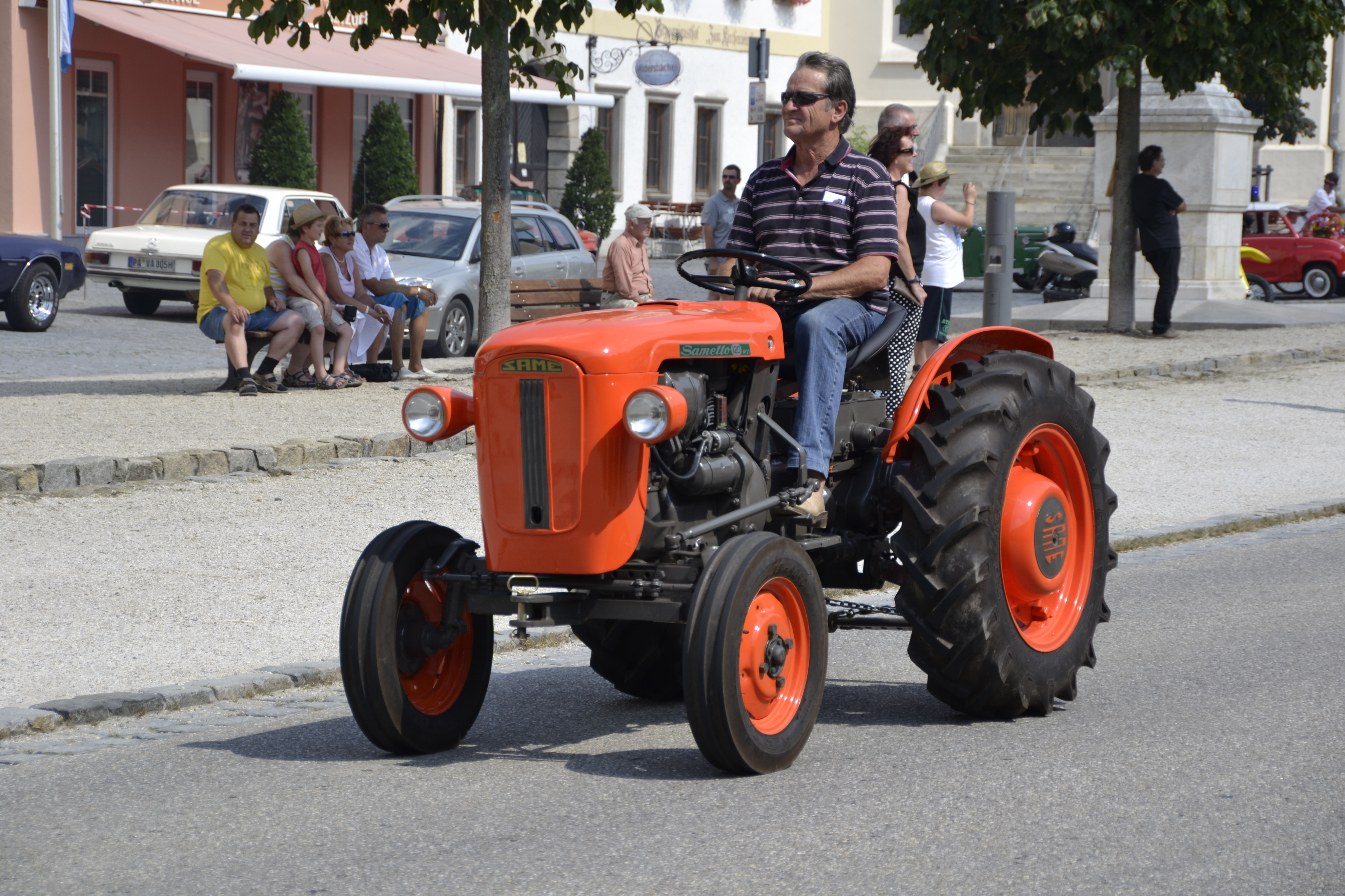 Der Oldtimerumzug in Aidenbach (Bayern) im August 2013.